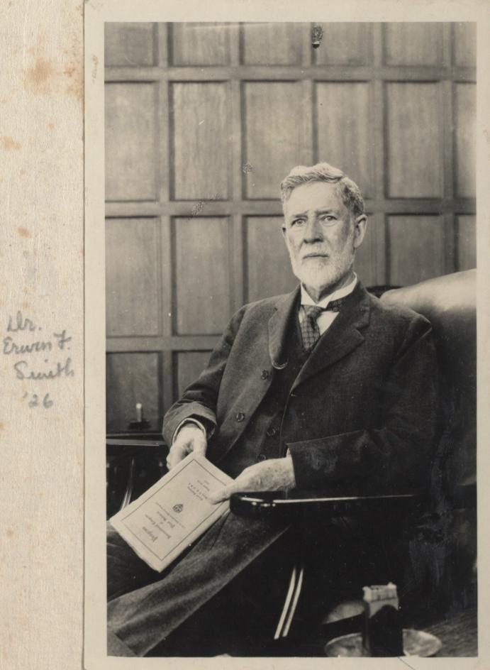 Erwin Frink Smith: fitopatólogo, bacteriólogo estadounidense (1854-1927)